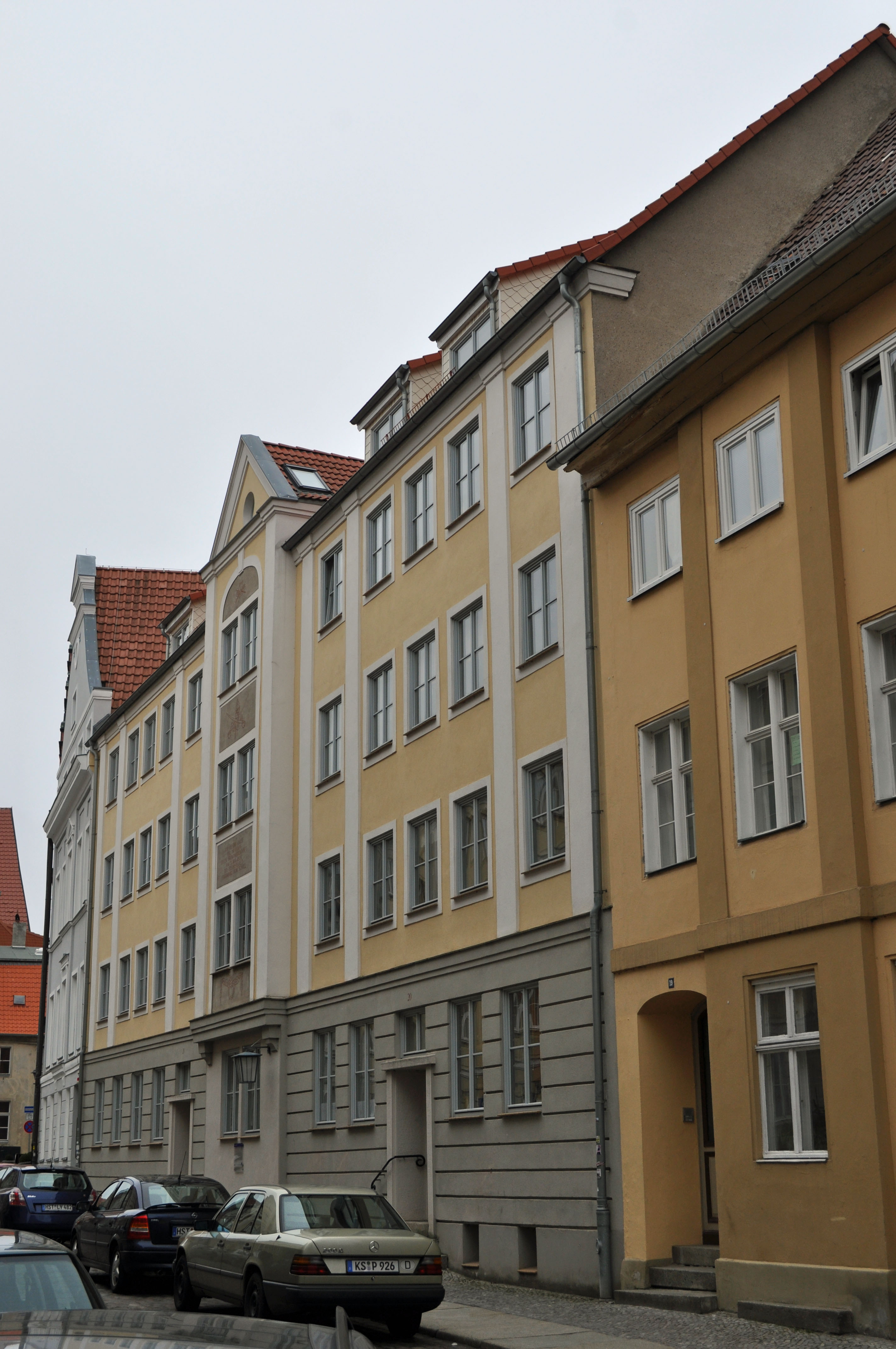 Gebäude bzw. Gebäudedetail in Stralsund. Straße und Hausnummer siehe Dateiname.